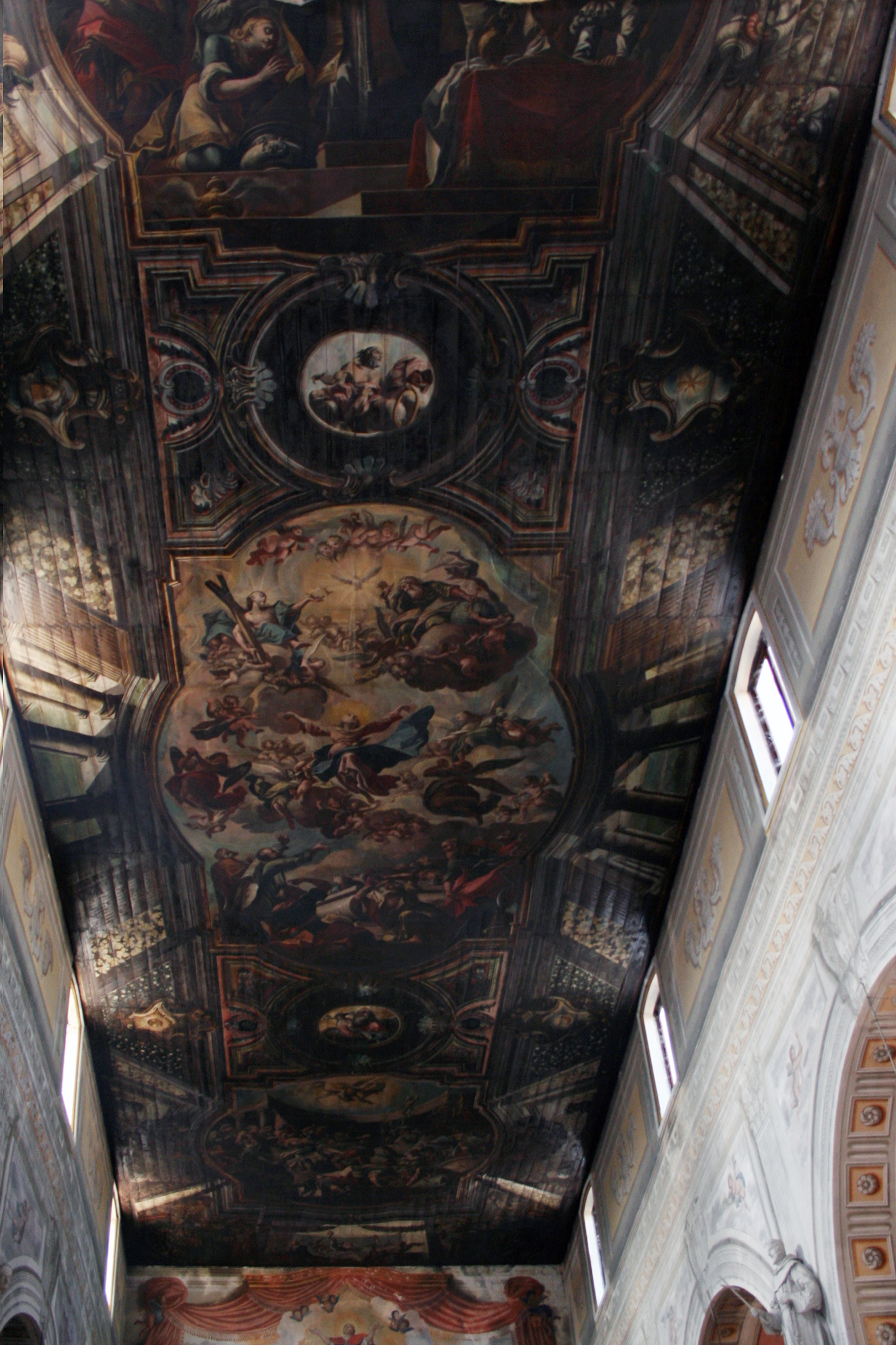 Soffitto ligneo della Chiesa di Santa Maria in Platea di Campli in provincia di Teramo. Immagine scattata nell'anno 2014.